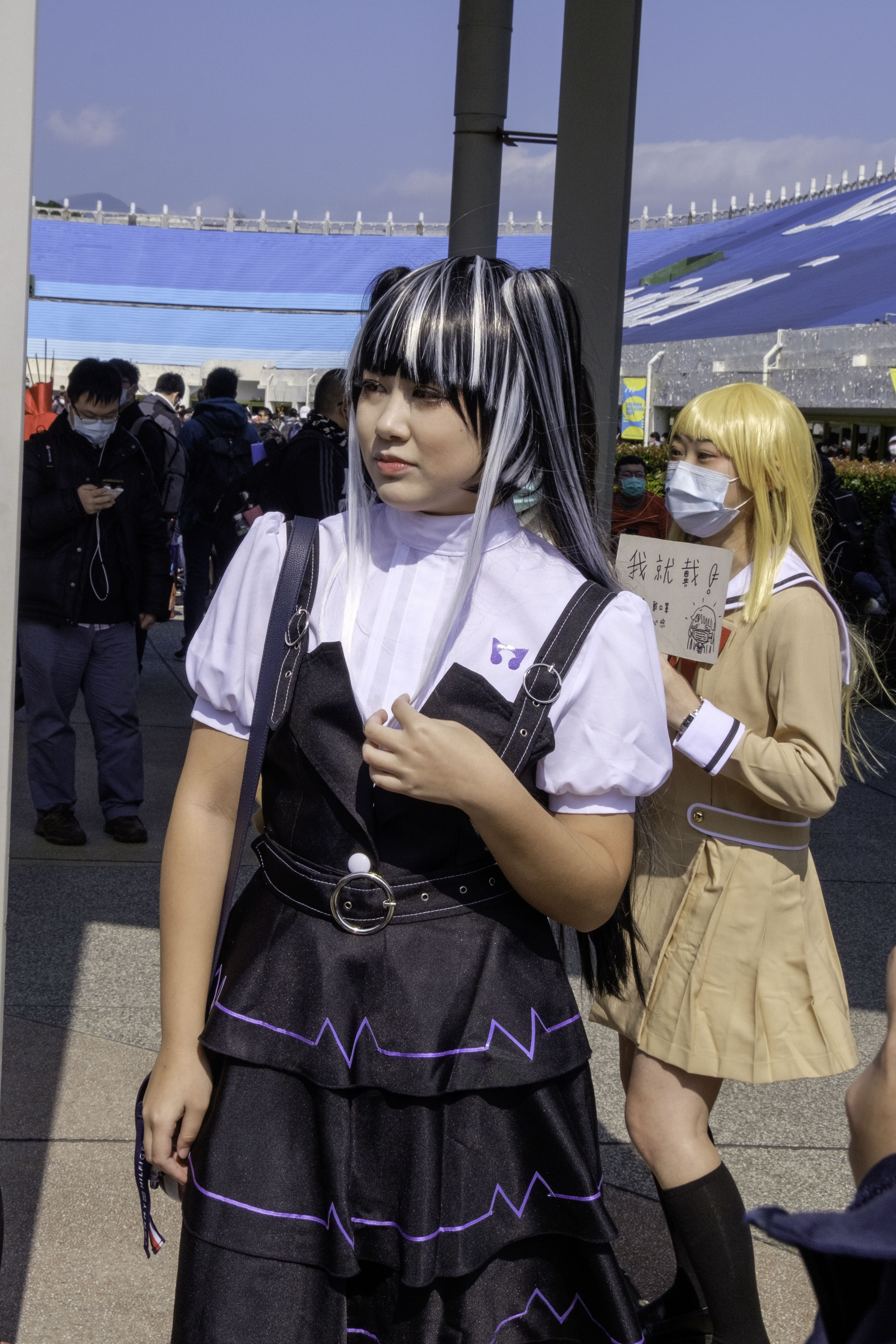 中文（台灣）: 第35屆開拓動漫祭，《BanG Dream! 少女樂團派對》三週年街頭訪問。